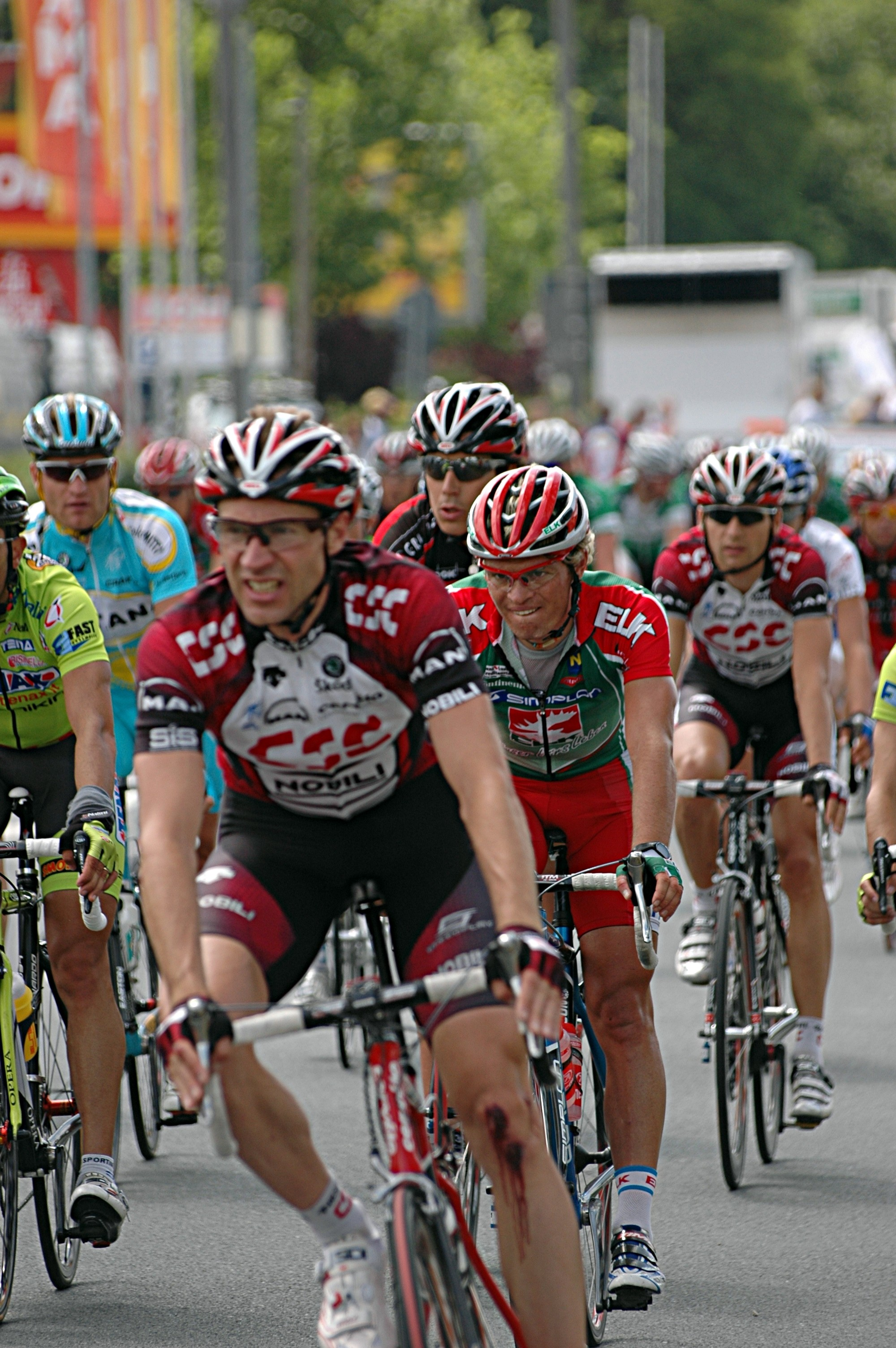 Jens Voigt (front) and Christian Pfannberger at the Bayern Rundfahrt 2007